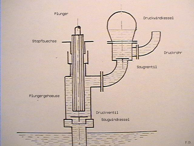 Plungerpumpe